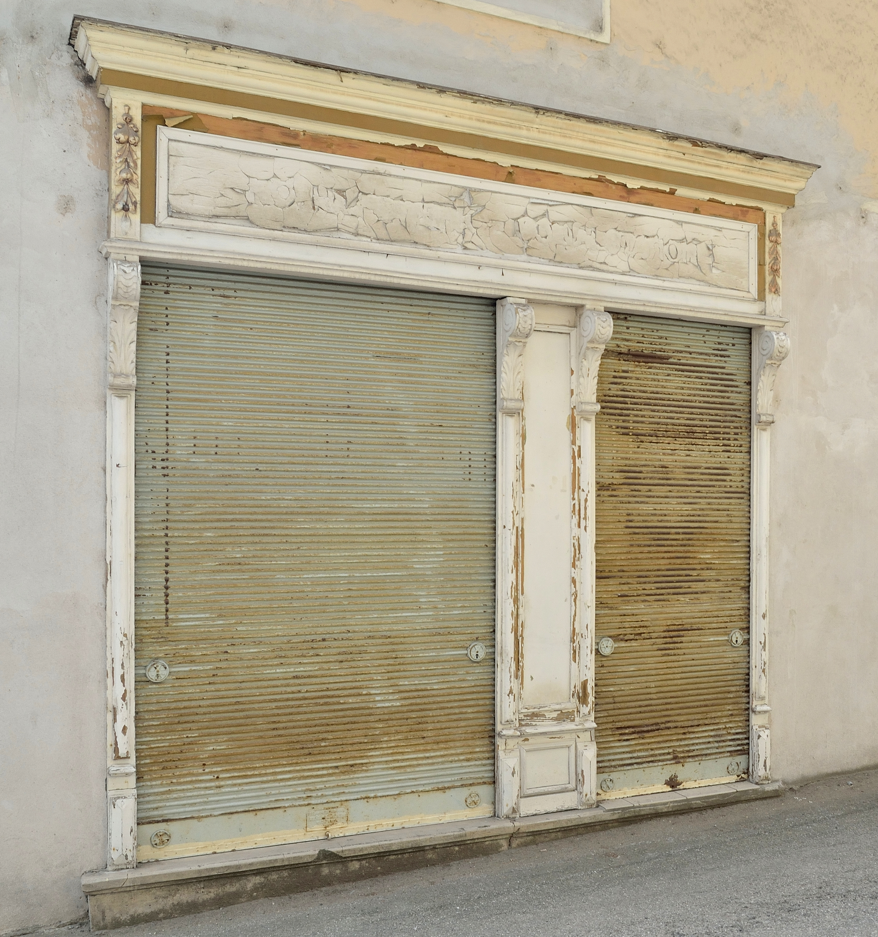 Ein geschlossenes Geschäft, Branche nicht mehr zu erkennen, in der Marktstraße 15 in Marbach an der Donau, Niederösterreich.